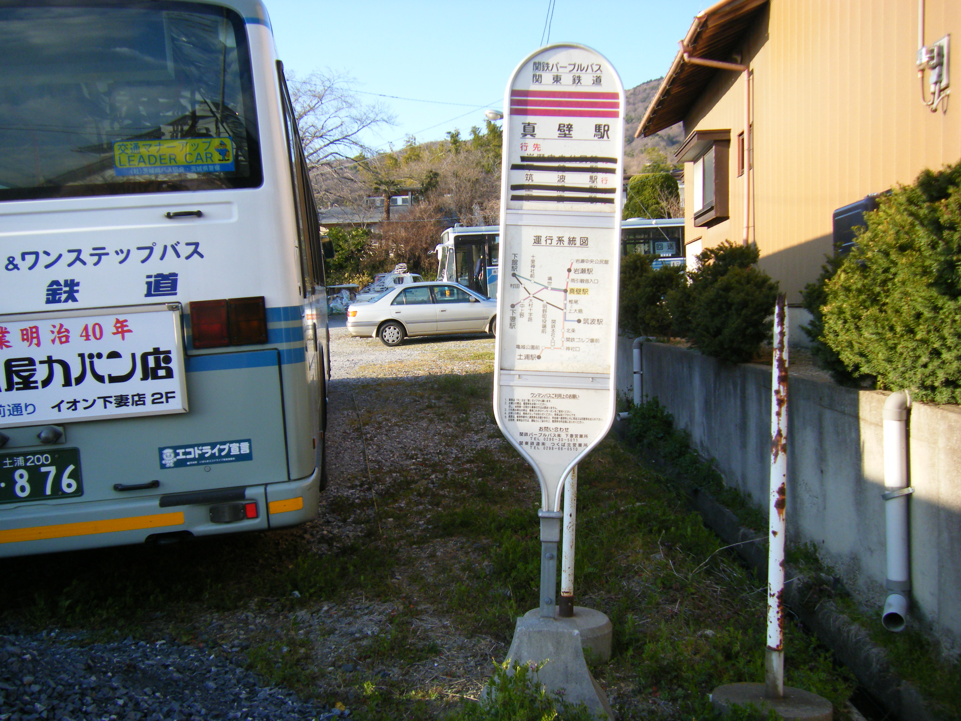 旧真壁駅バス停